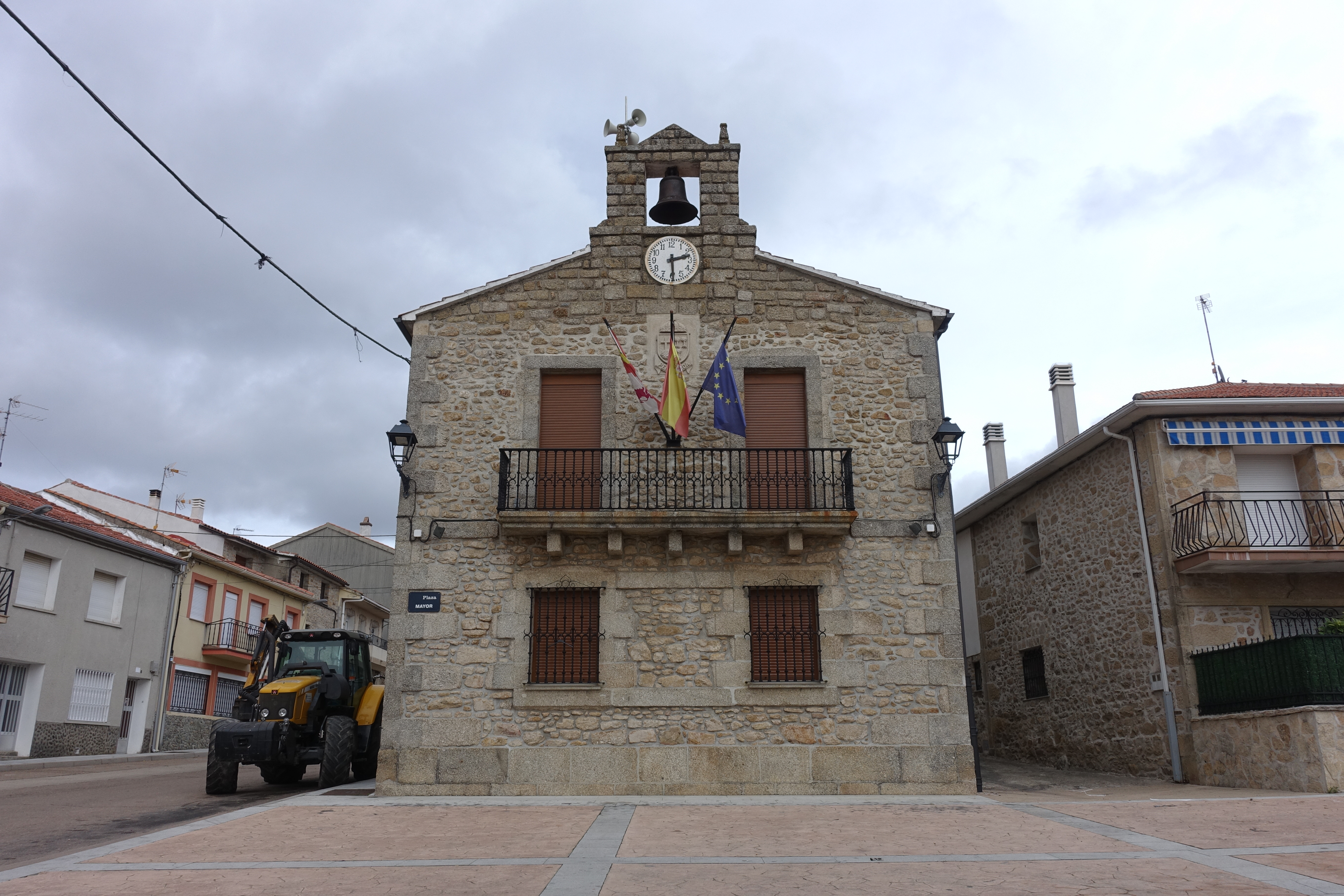 Casa consistorial de Peñaparda (Salamanca, España).